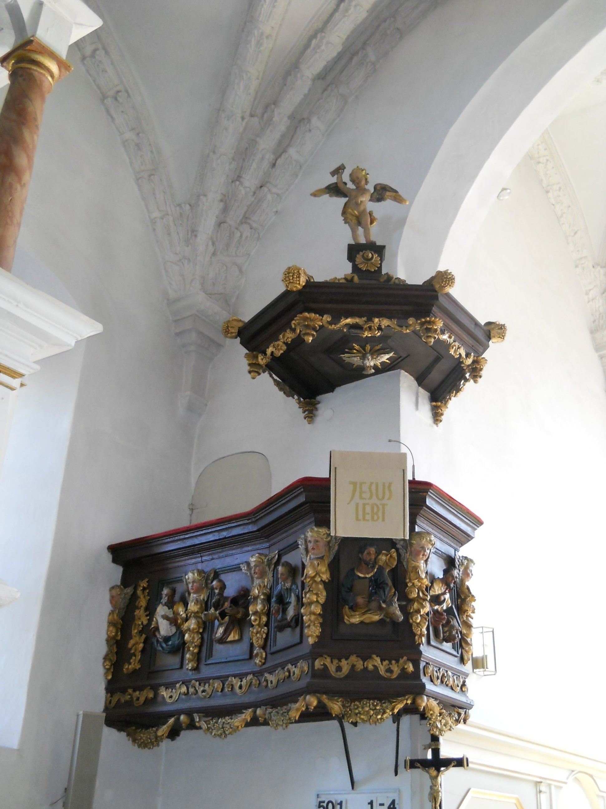 Laubenzedel, Ortsteil von Gunzenhausen im Landkreis Weißenburg-Gunzenhausen (Bayern), Evang.-luth. Pfarrkirche St. Sixtus,Volpini-Kanzel